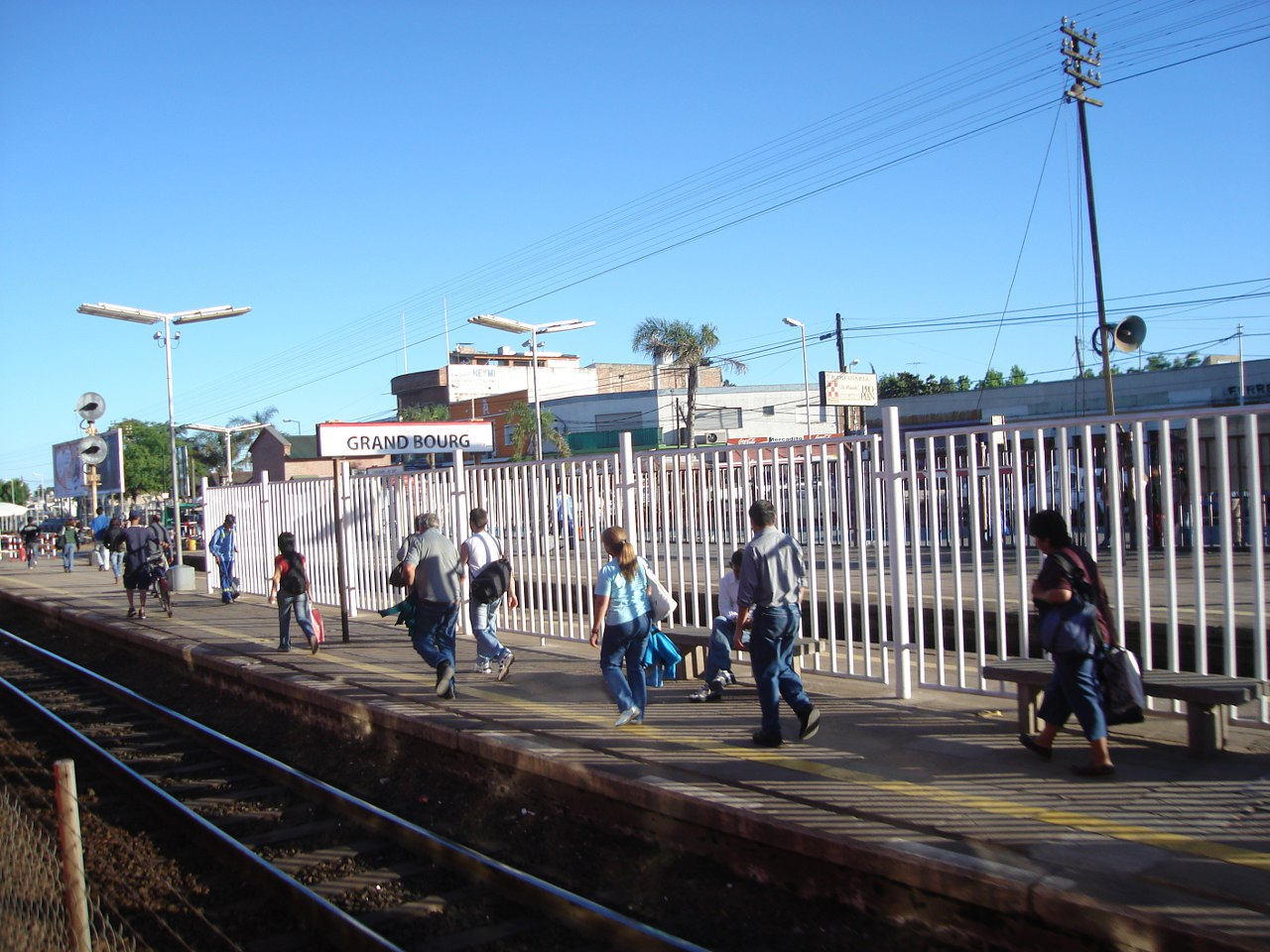 Punta sur de la estación Grand Bourg del Ferrocarril General Belgrano. Grand Bourg, partido de Malvinas Argentinas, provincia de Buenos Aires, República Argentina.